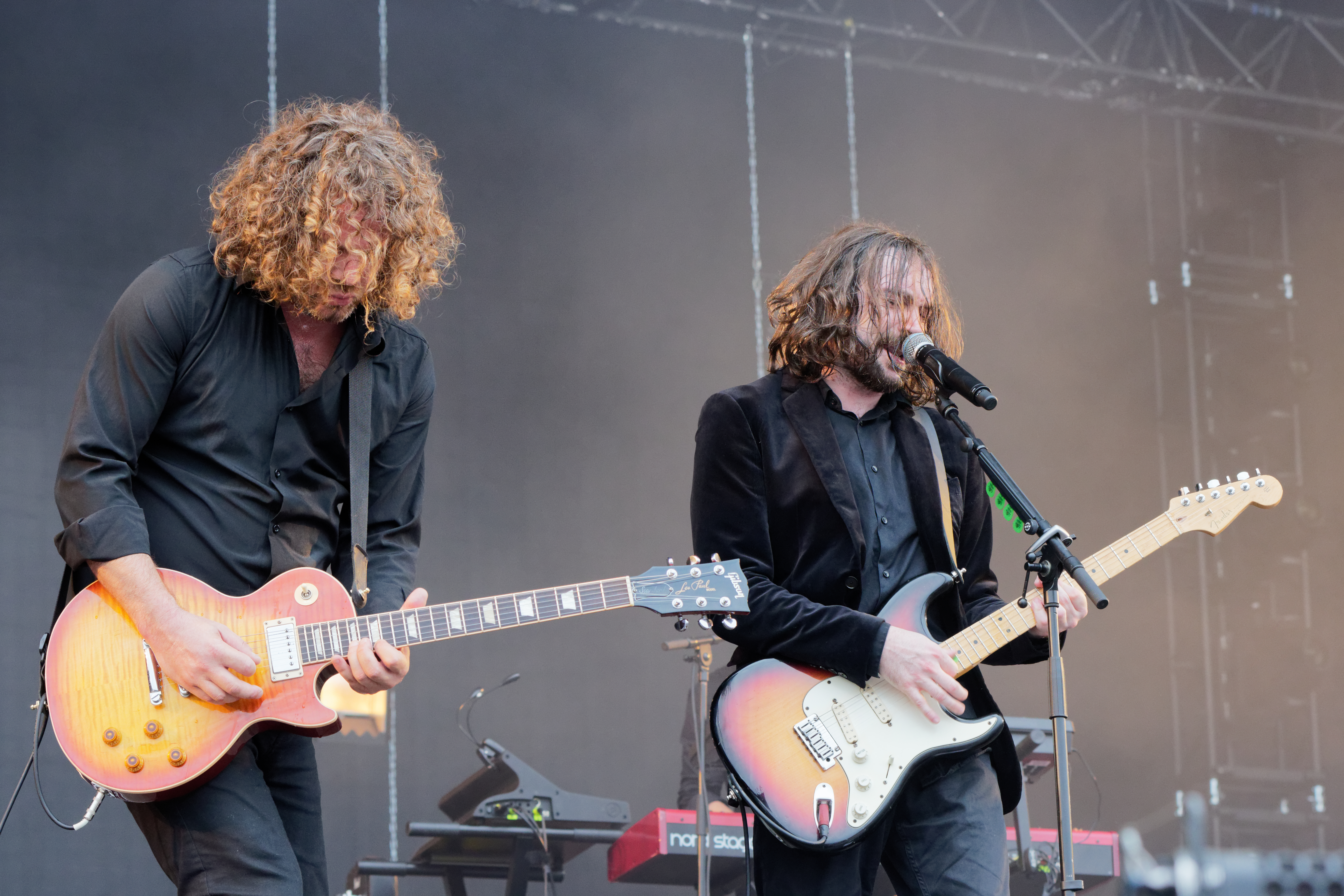 Matmatah en concert lors du festival des vieilles charrues 2017.